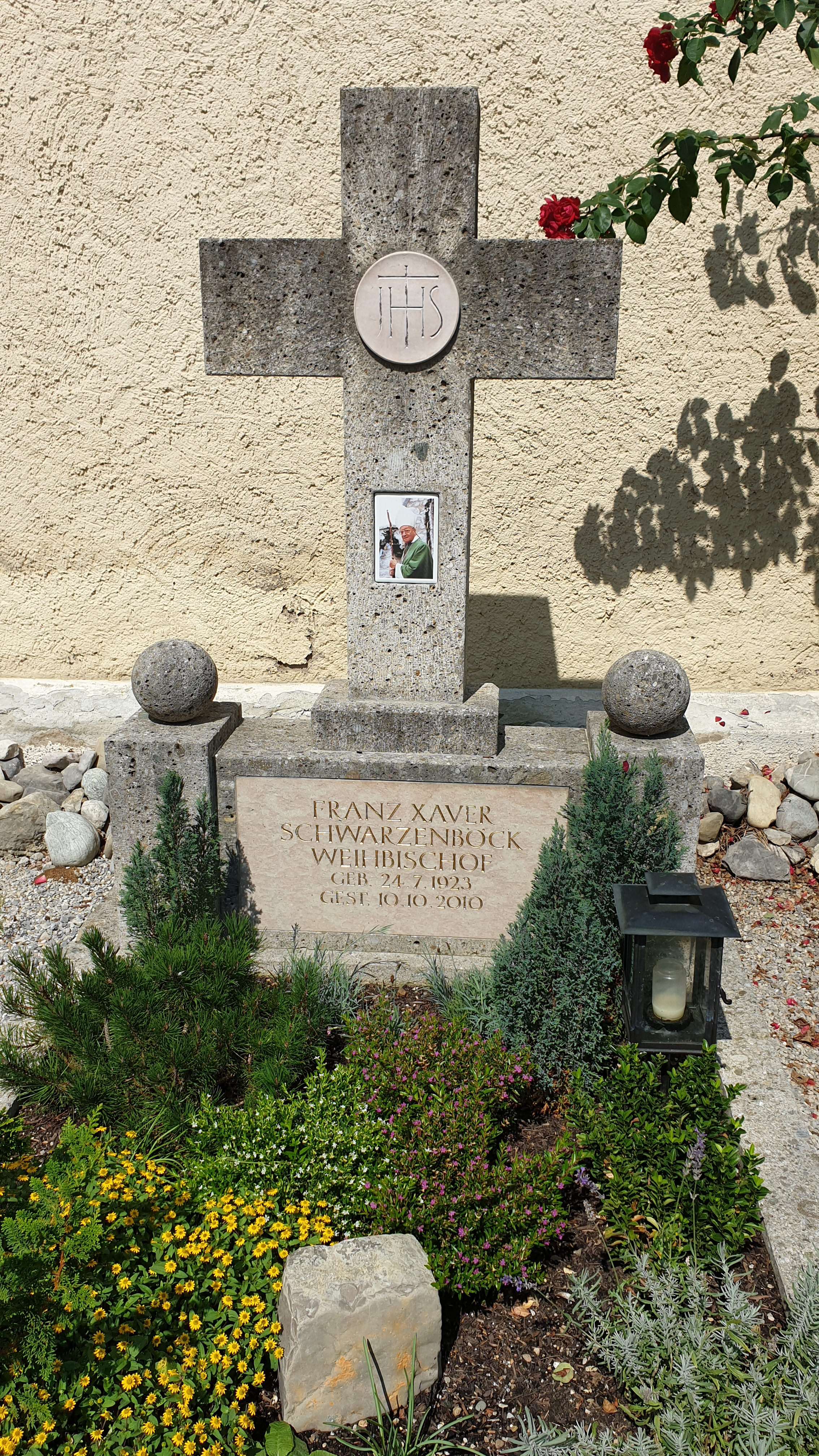 Grabstätte Weihbischof Franz Xaver Schwarzenböck auf dem Kirchhof Kloster Weyarn